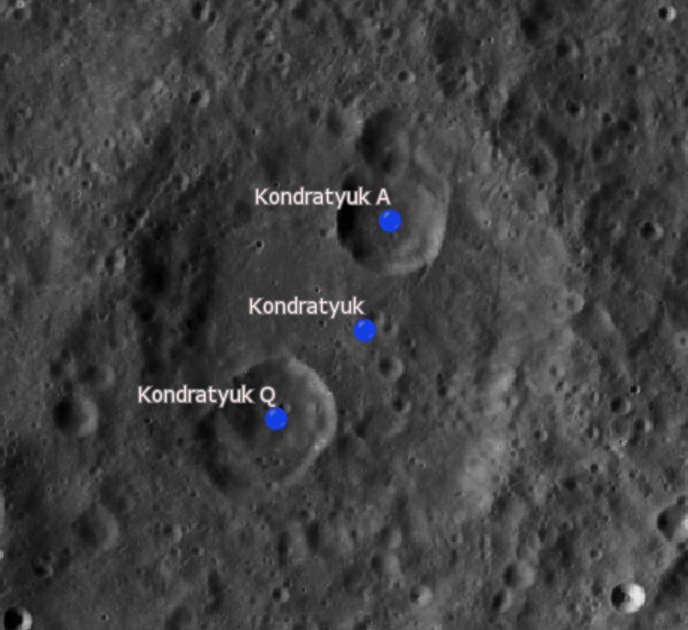 Cráter lunar Kondratyuk. Cráteres satélite. (Imagen LRO)